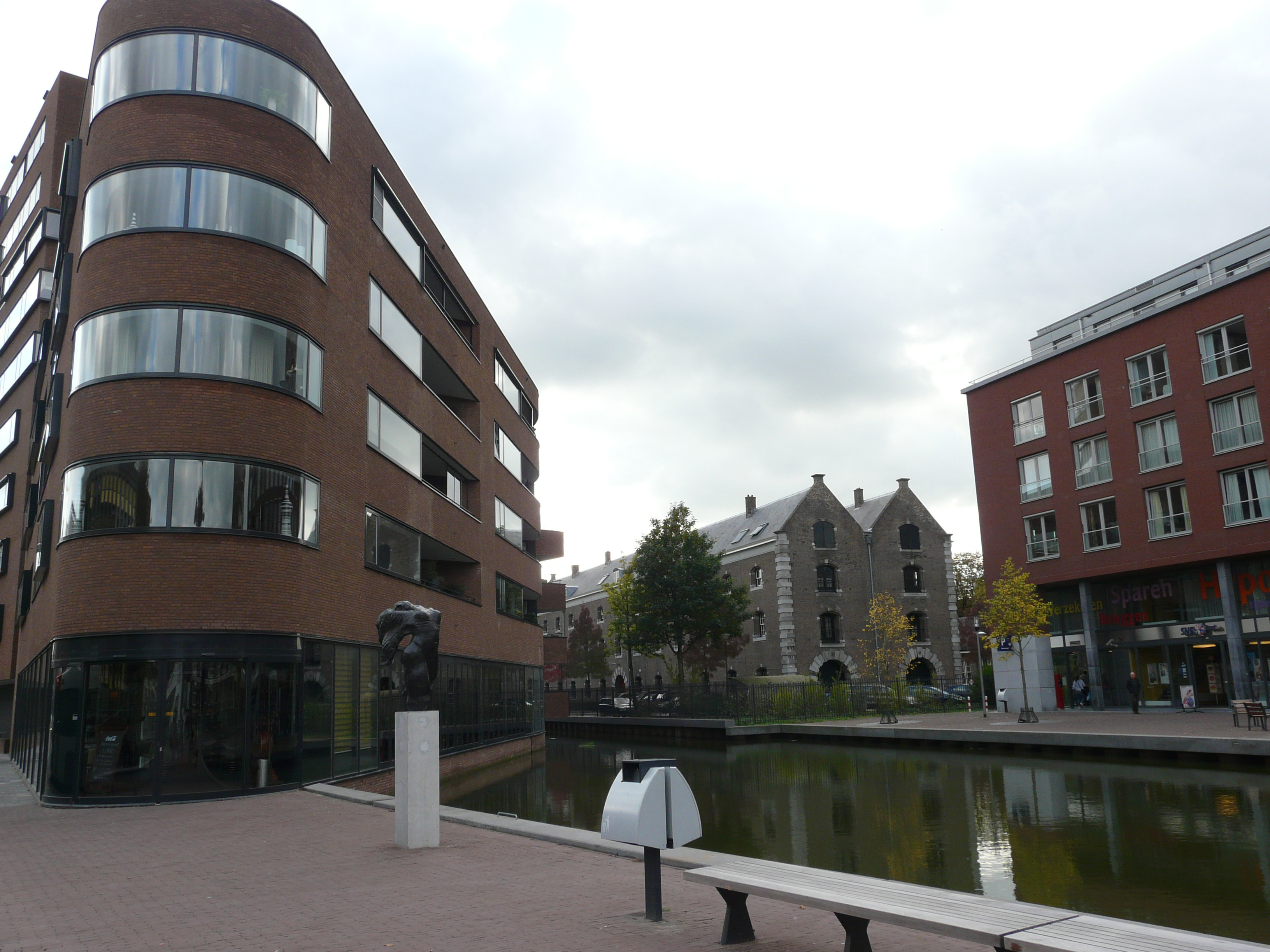 Zicht op deel van de Markendaalseweg met het einde van de Haven van Breda. Niet ver van het centrum van Breda